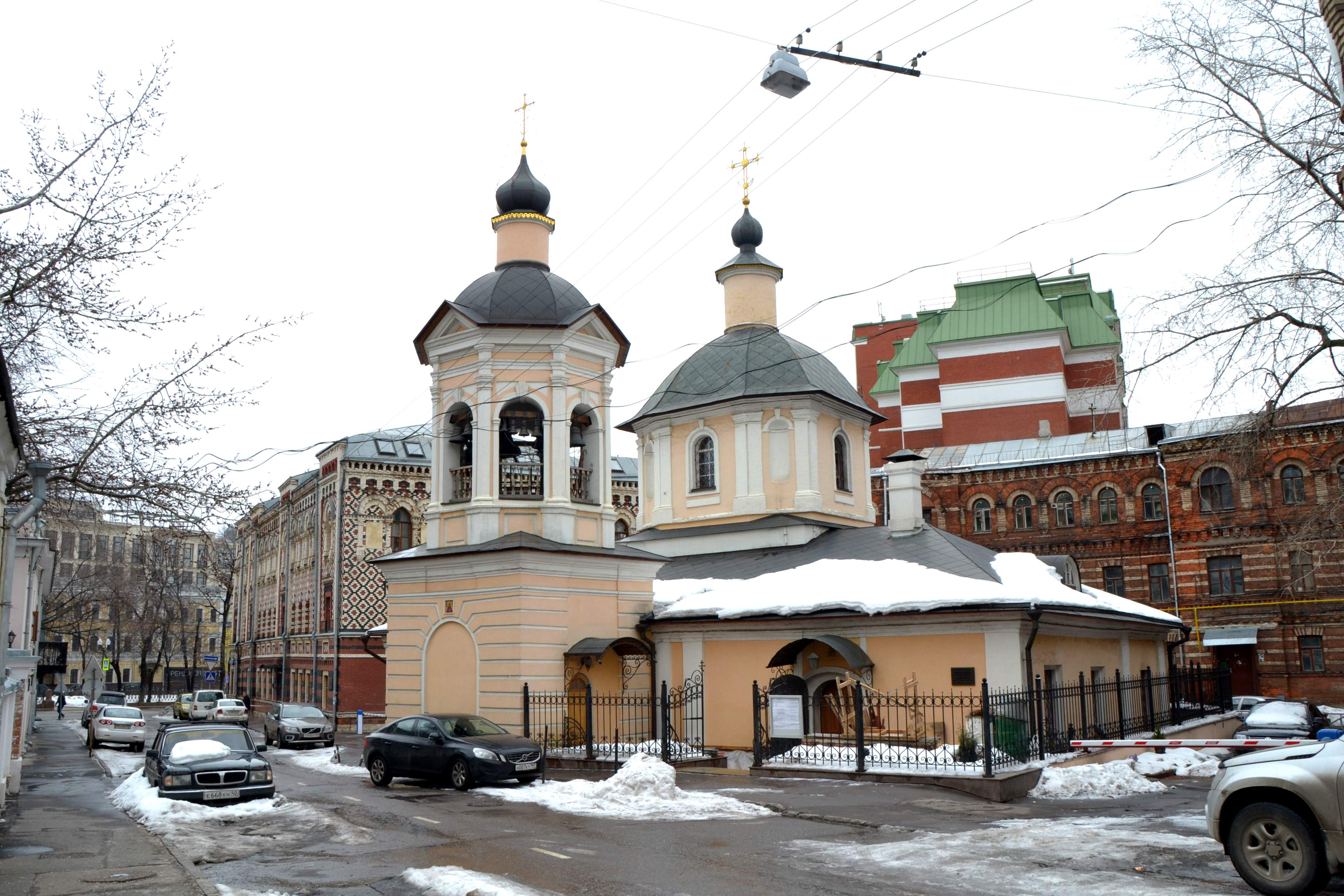 Церковь преподобного Сергия Радонежского в Крапивниках (Москва и Московская область, Москва, Крапивенский переулок, 4, строение 2)